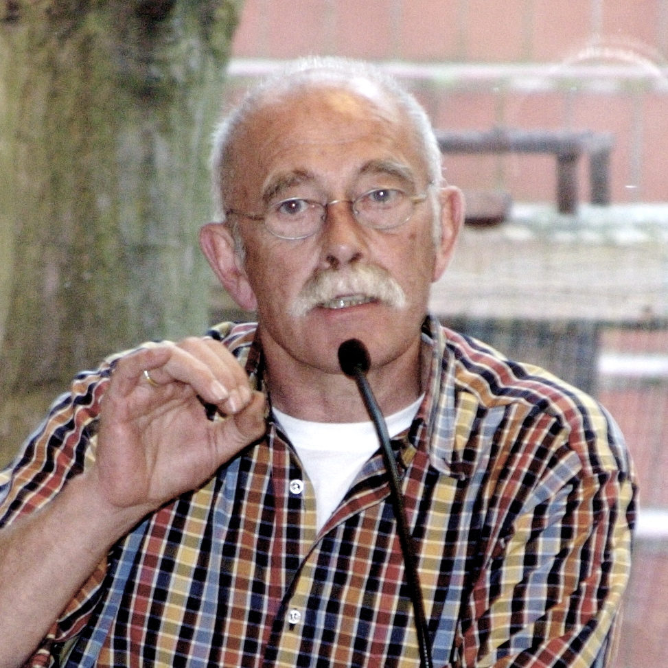 Harald Werner (Linkspartei) auf der Gewerkschaftspolitischen Konferenz in Hamburg am 14. April 2007